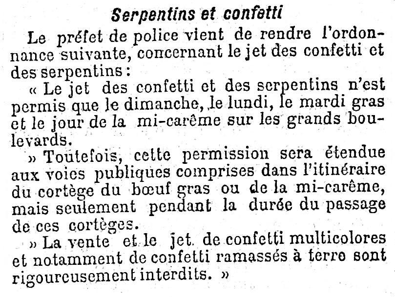 Article sur les confettis et serpentins et leur autorisation ou interdiction à Paris en 1900.